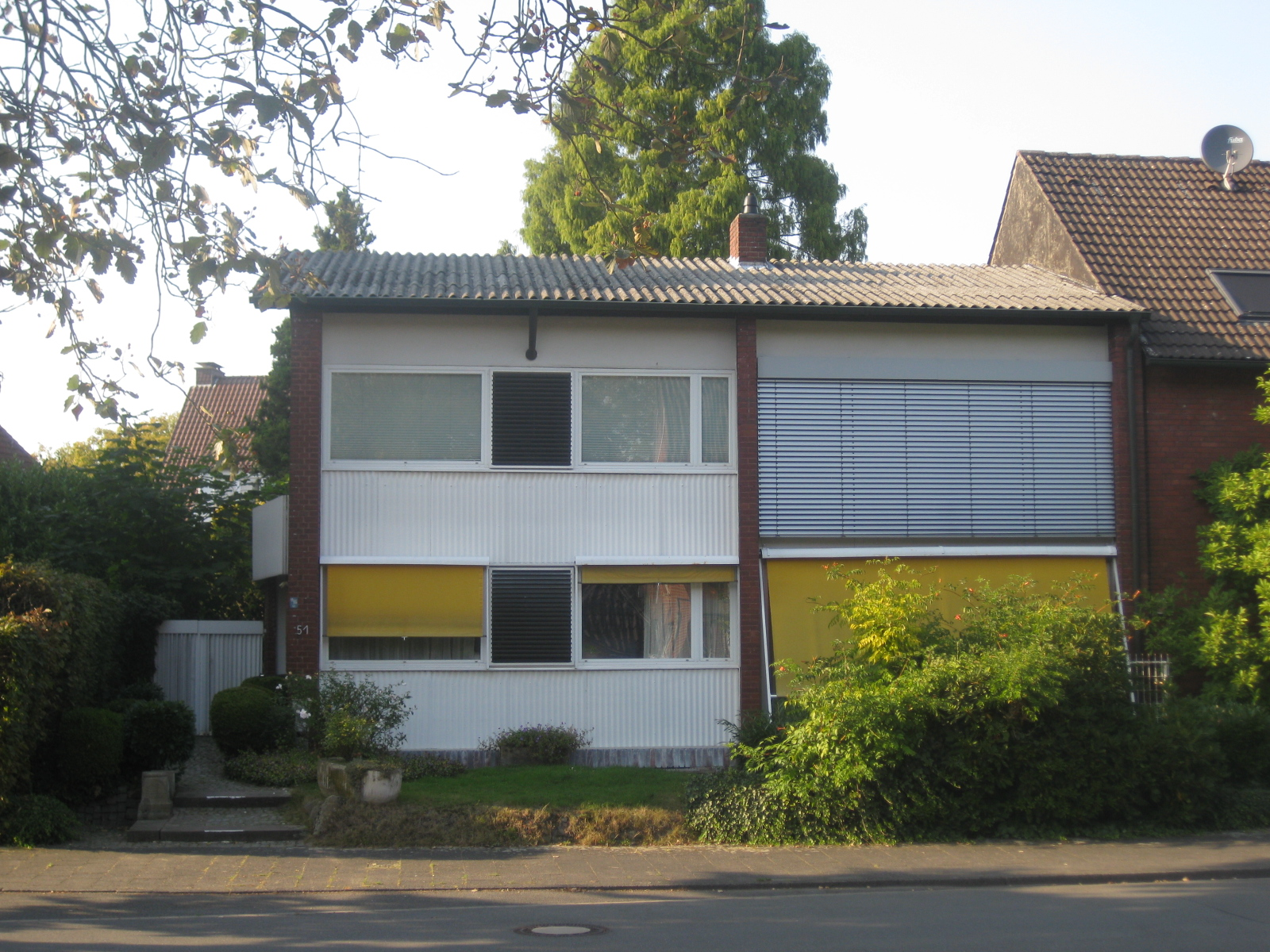 Westdeutsche Nachkriegsmoderne in der Tradition Egon Eiermanns ( flach geneigtes Eternitdach, große Fenster und Sonnenschutz durch farbige Markisen)